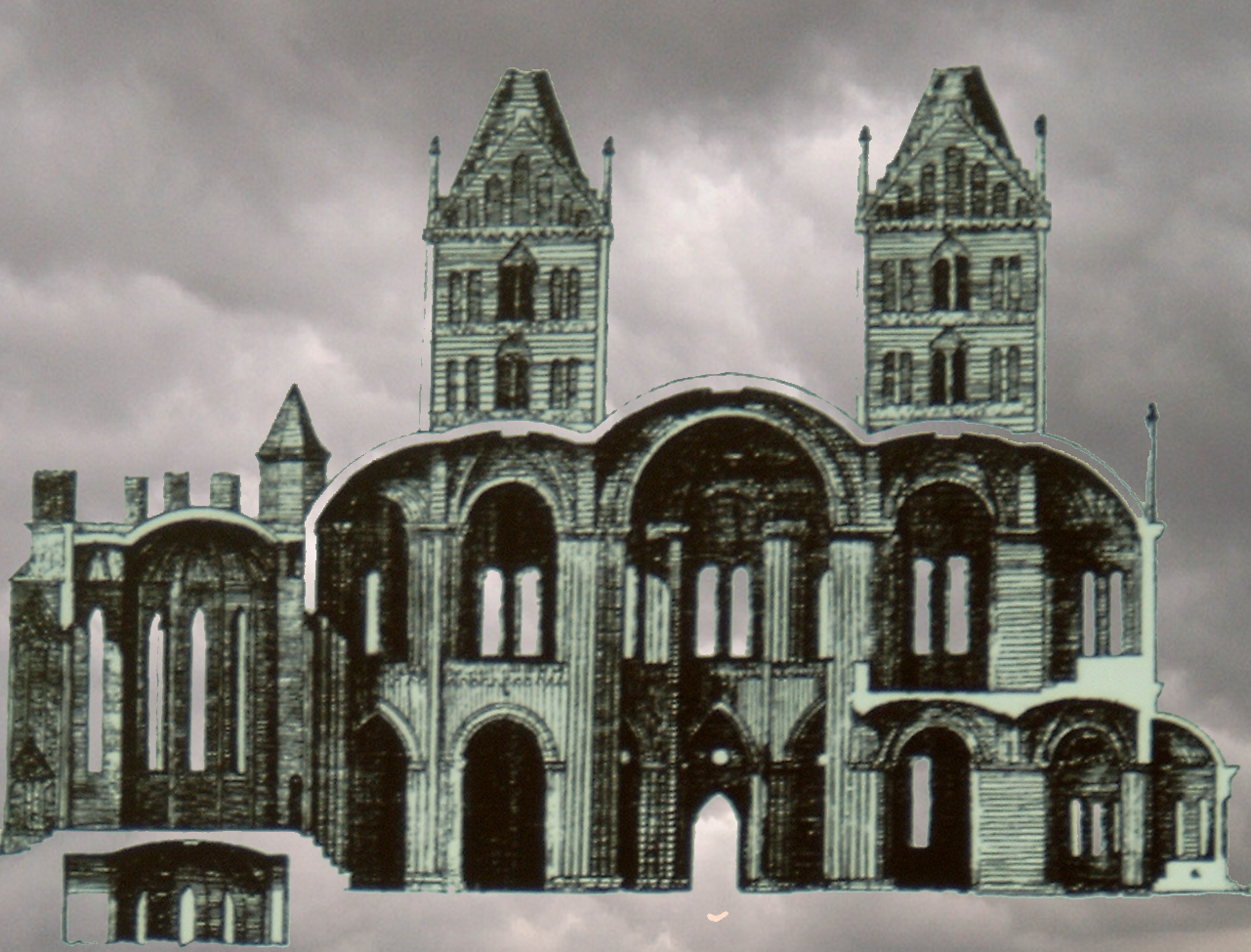 Marienkirche, Schnitt aus dem 19.Jhrhndrt